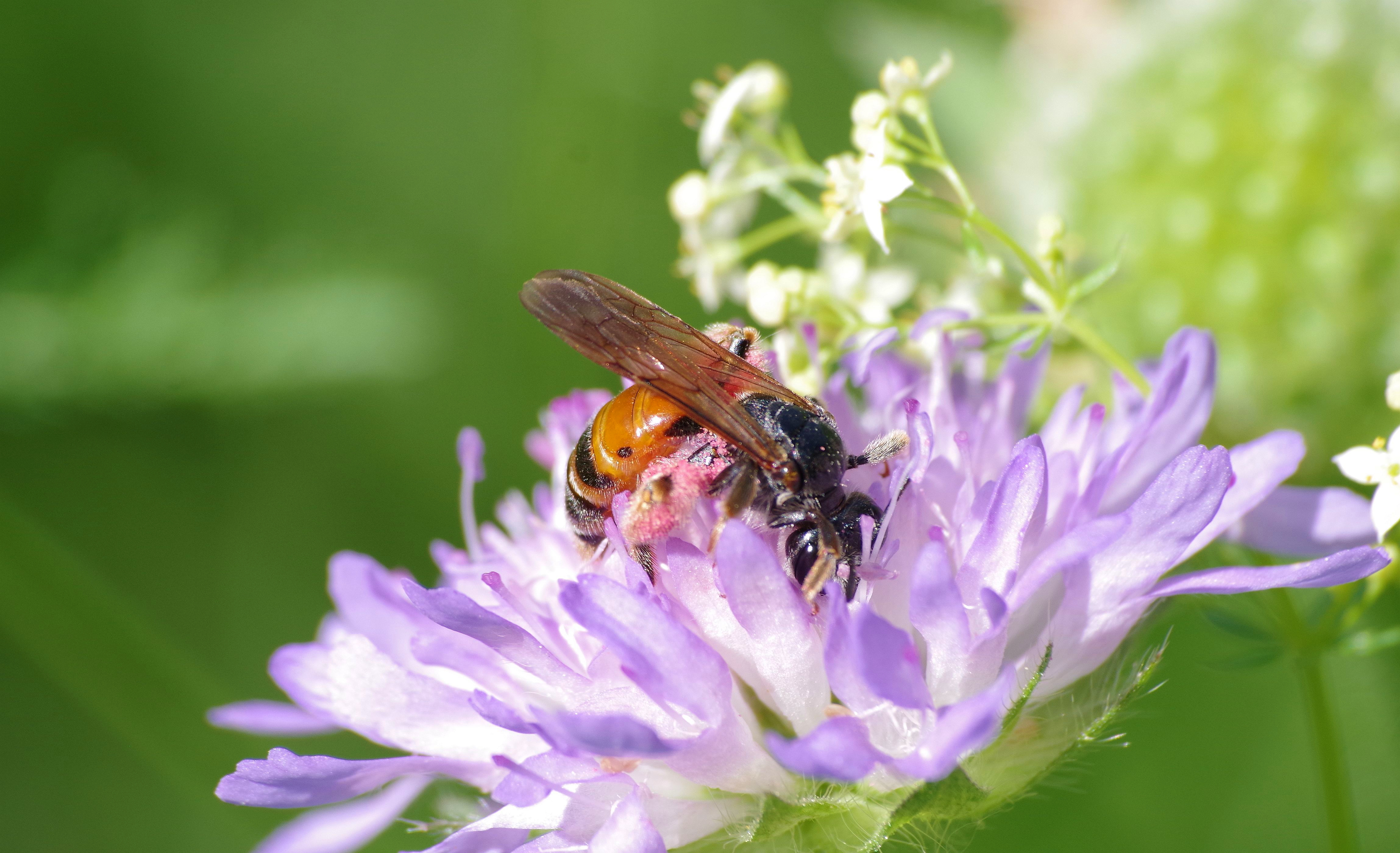 Pískorypka chrastavcová živící se nektarem ze své živné rostliny. Ohrožený druh samotářské včely. Vyfocený v Turnově, v Českém ráji.